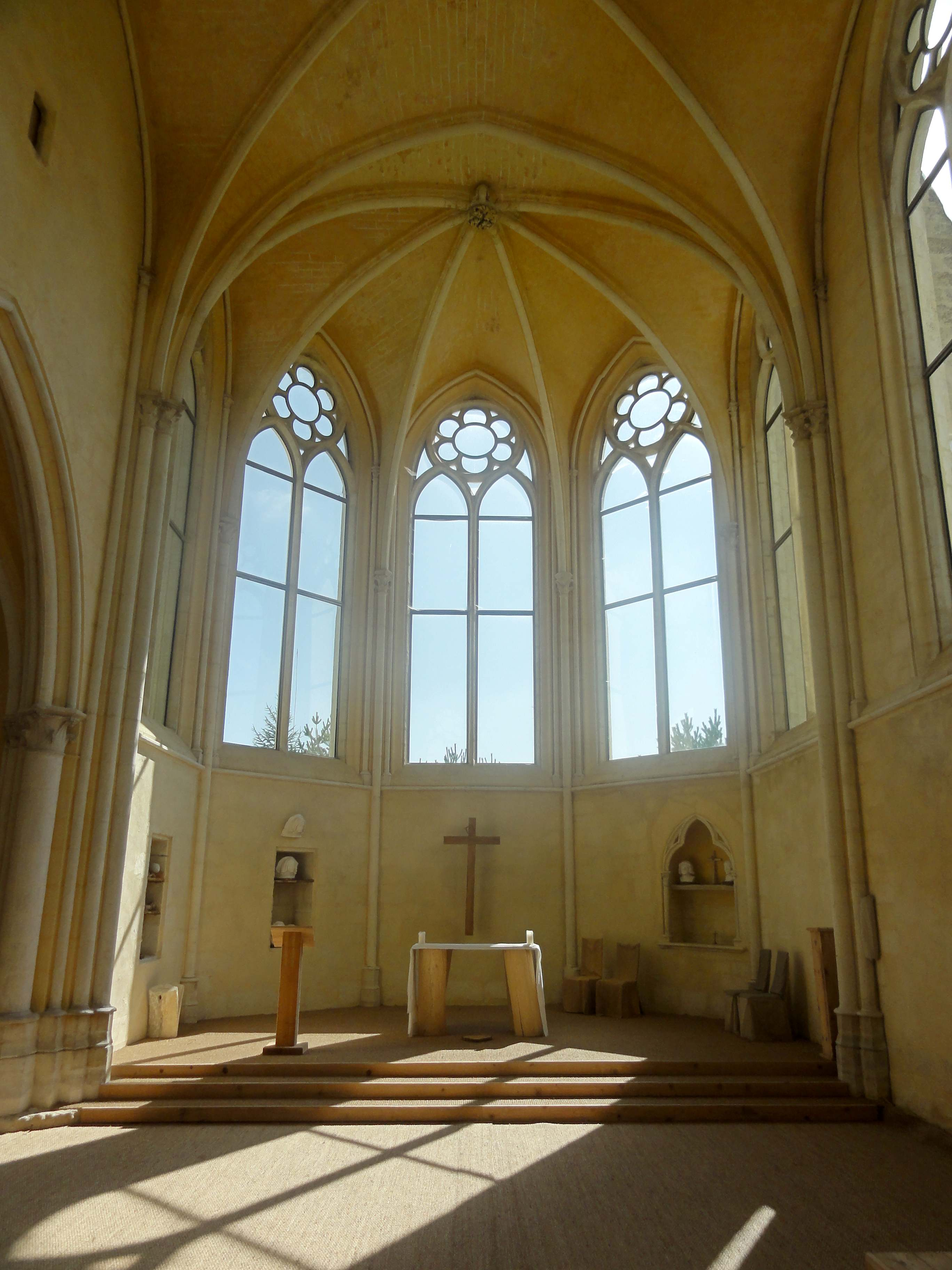 Intérieur de la chapelle, vue vers l'est.